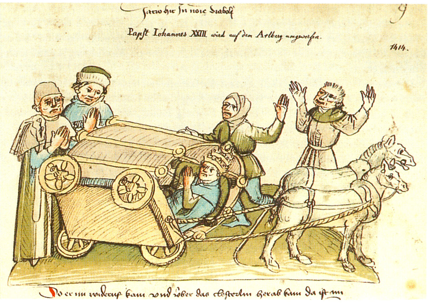 Papst Johannes (XXIII.) verunglückt am Arlberg auf seinem Weg zum Konstanzer Konzil Konzilchronik